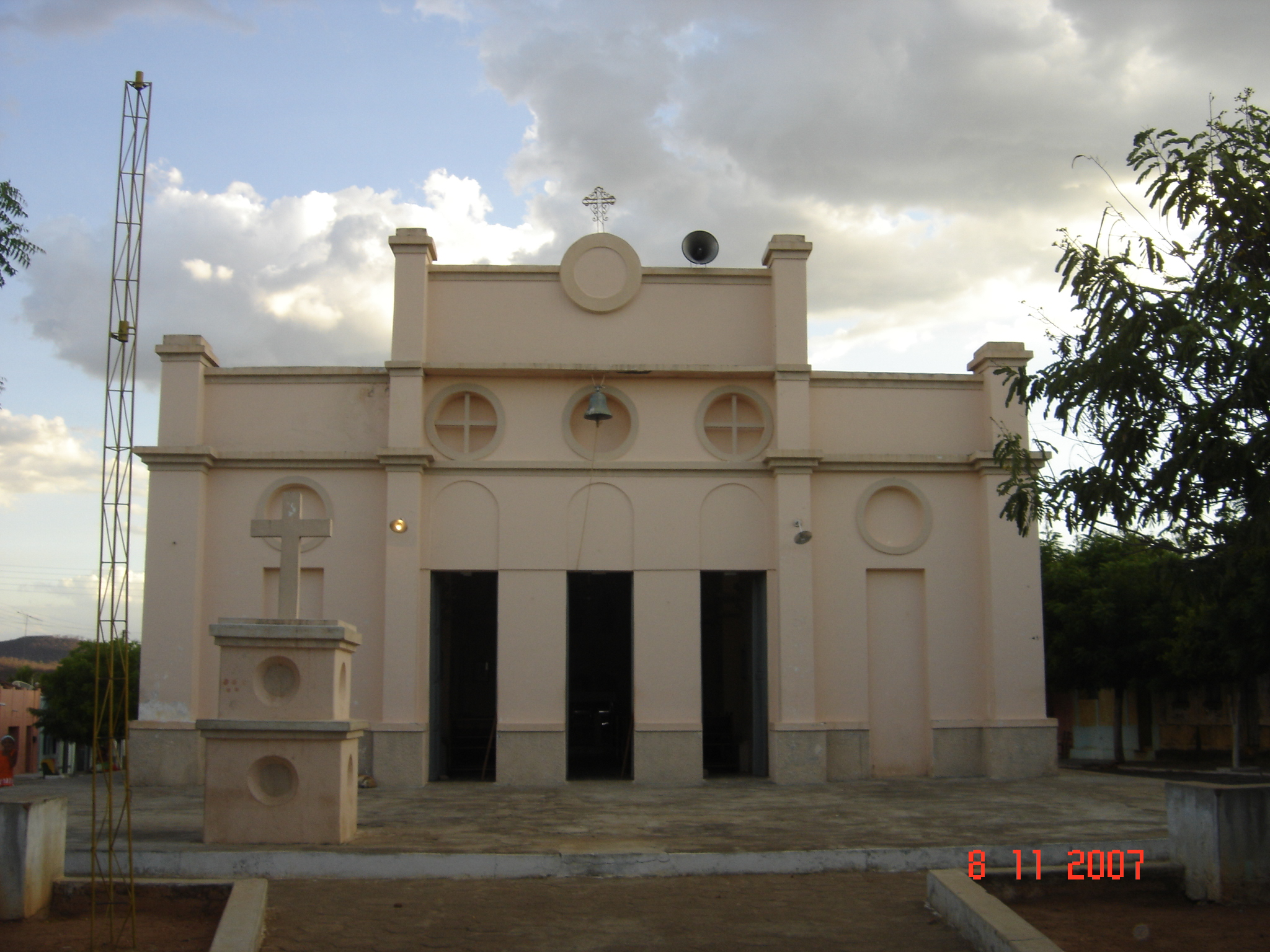 Vista frontal da Capela N. Sª do Perpétuo Socorro